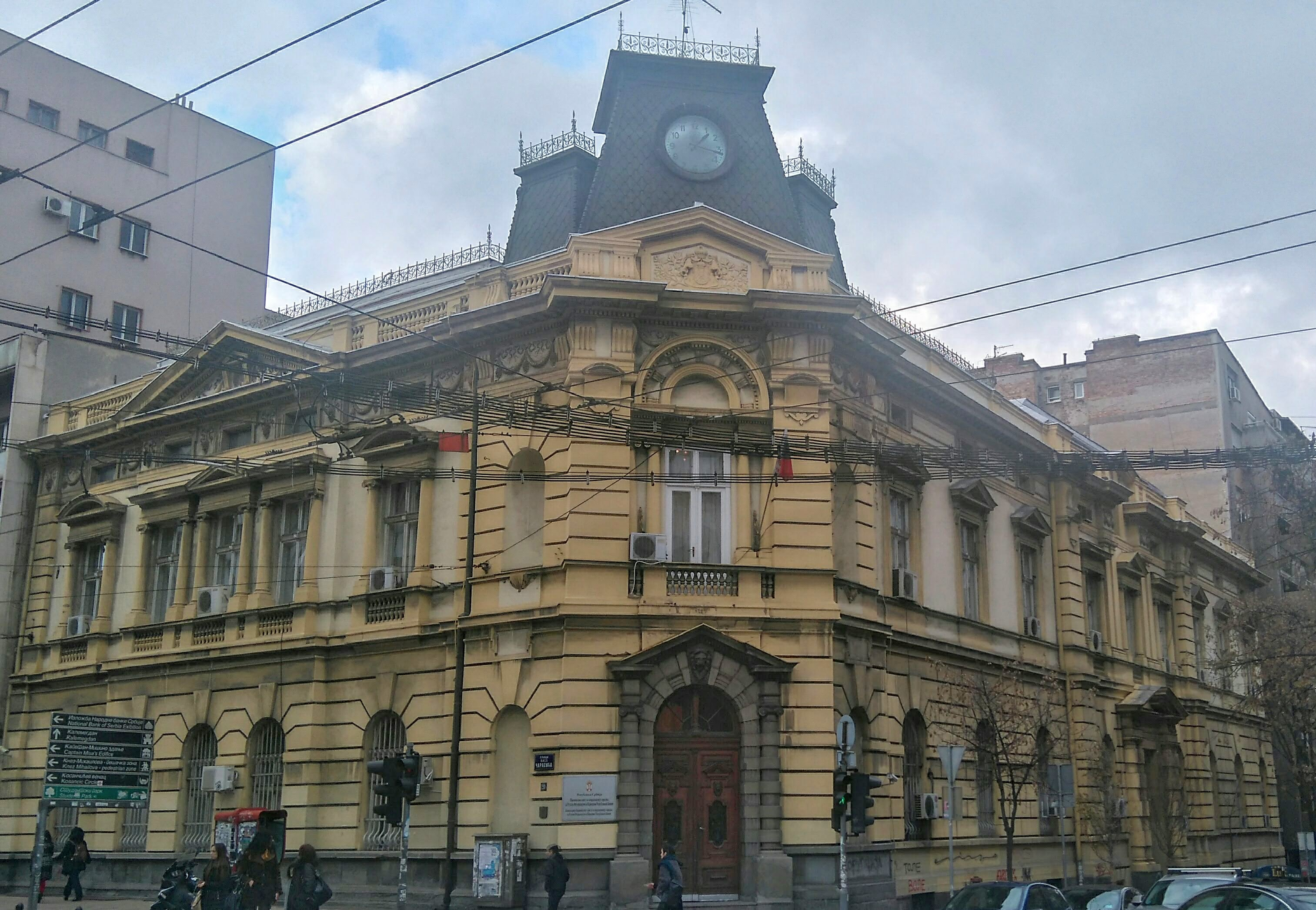 Srpski (latinica): Zgrada Klasne lutrije